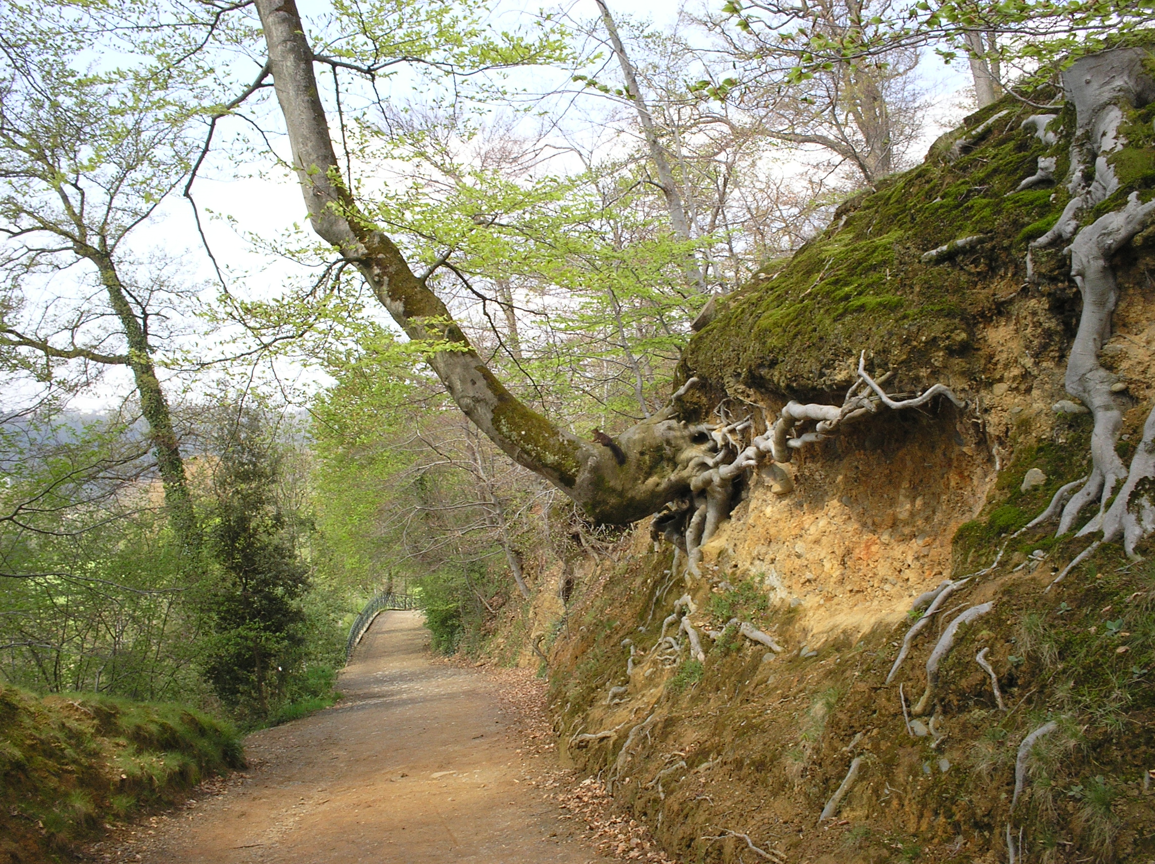 Butte du parc du chateau de Pau